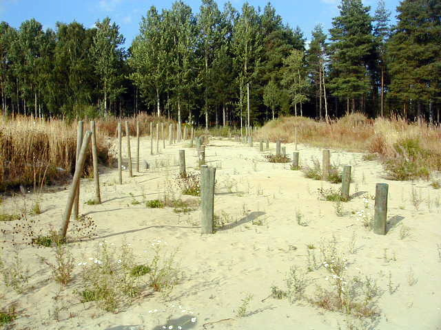 Stolpehull etter langhuset på Veien (Veien Kulturminnepark)